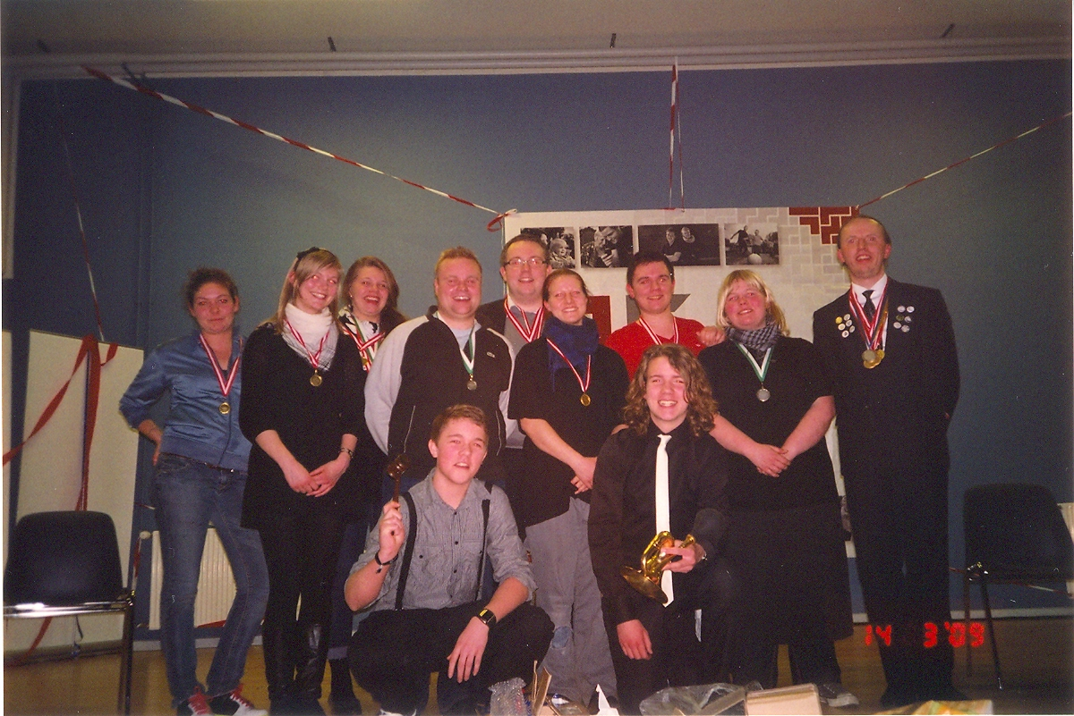 Ved Danske Skoleelevers 5-års jubilæumsgeneralforsamling i marts 2009 modtog DSE gaver fra ordensrådet i Pligtopfyldende, Arbejdstro Medlemmers Præmieforening. DSEs formand, Troels Boldt Rømer og næstformand Aksel Christensen Silva (tv) modtog gaverne på DSEs vegne.